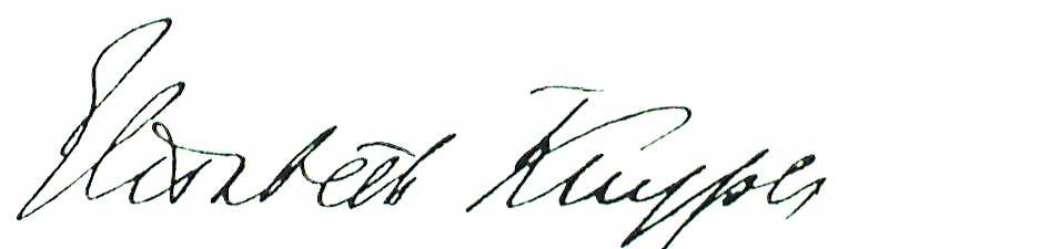 Elisabeth Kuyper Signatur 1926 Unterschrift zu einer autobiographischen Skizze in Führende Frauen Europas, 2 Bände. München 1928 und 1930